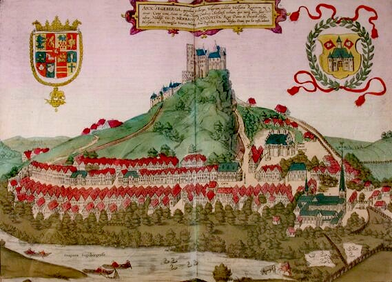 Aus den Stadteansichten von Braun und Hogenberg Köln 1588, immer wieder und an verschiedenen Orten im Netz.